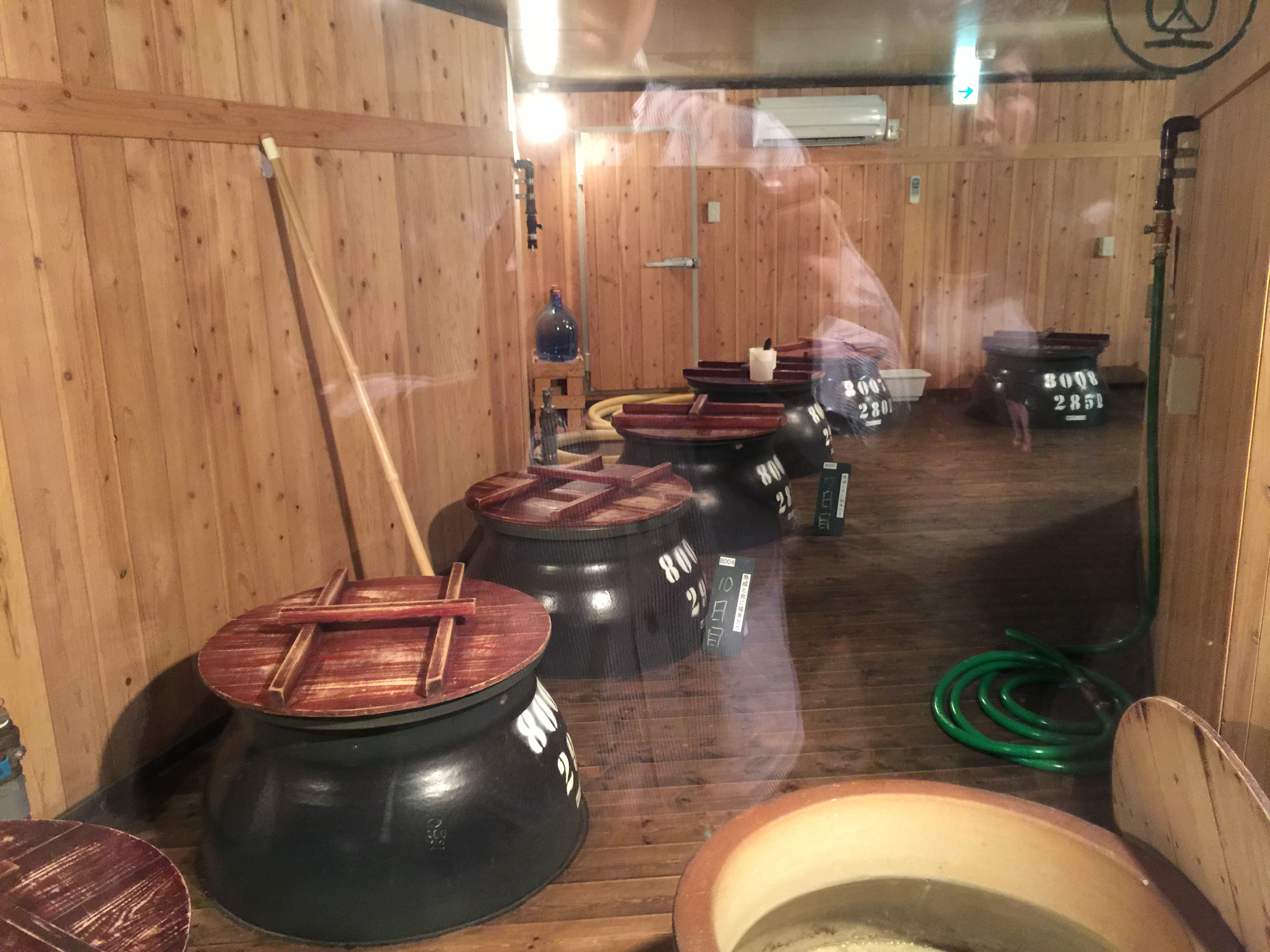 串木野鉱山の坑道を使用した酒造施設